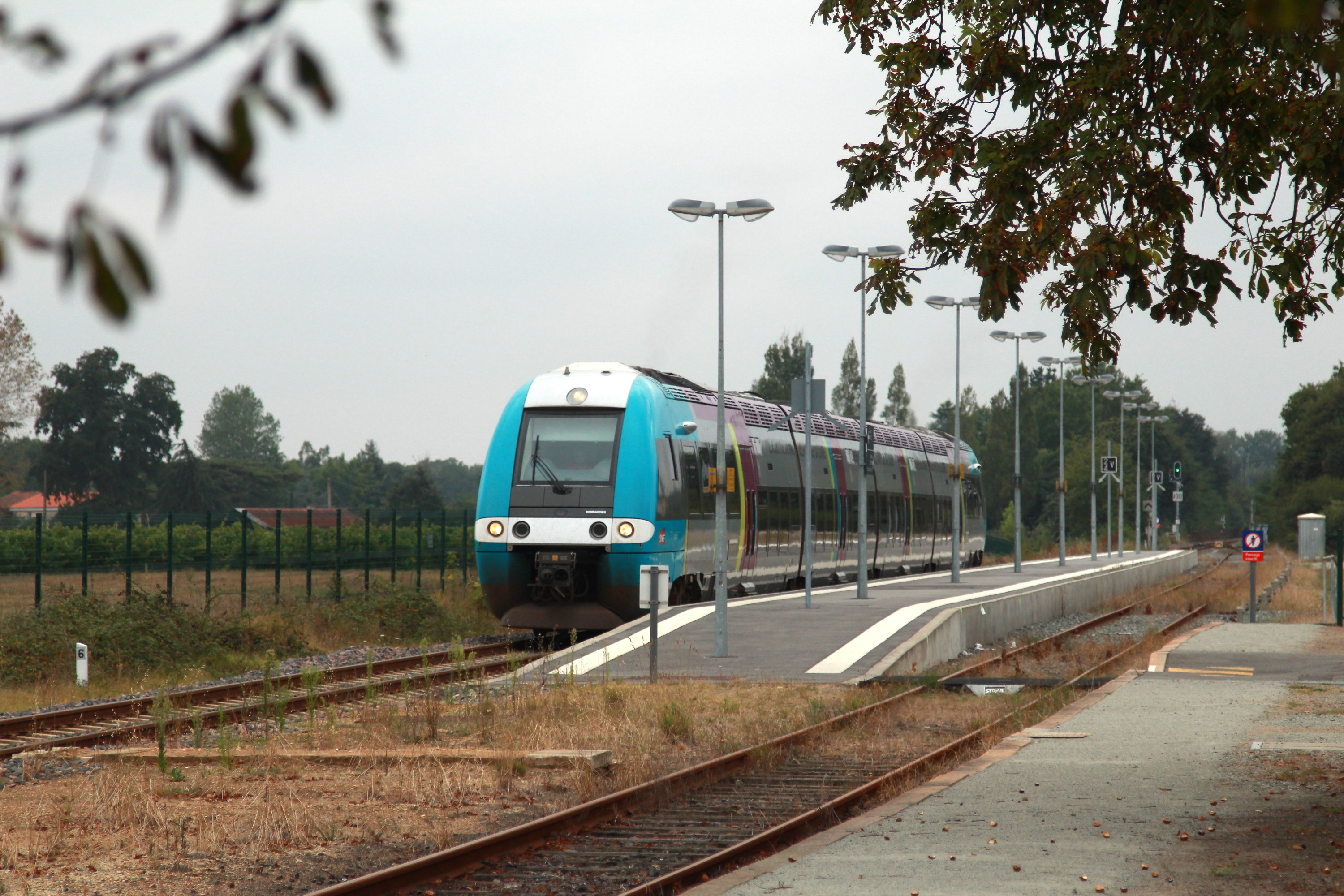 XGC repartant de Bouaye.